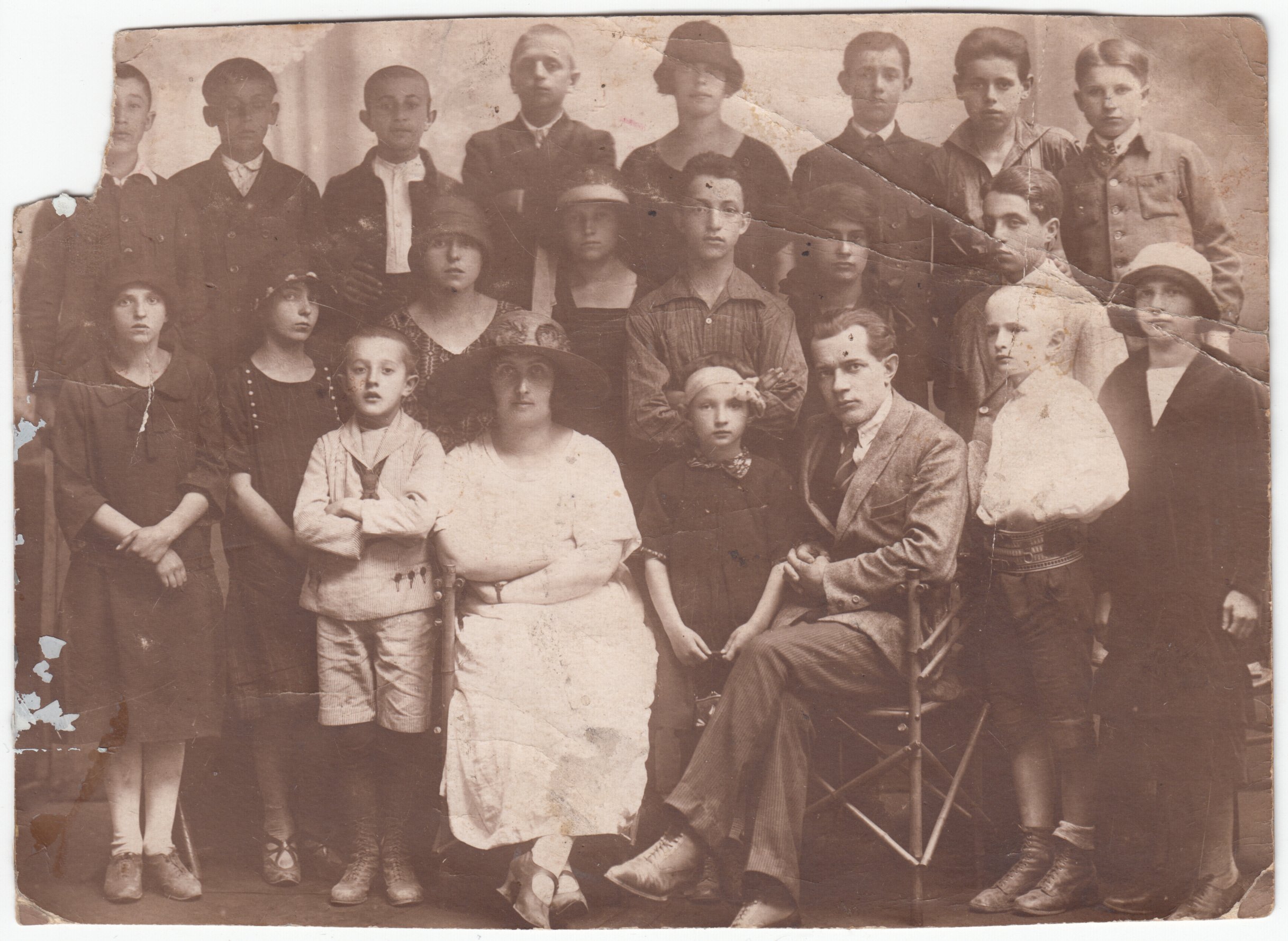 Bircza Szkoła Powszechna 1920